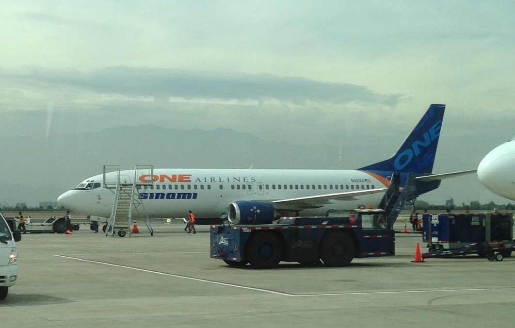 Un avión de One Airlines estacionado en el Aeropuerto de Santiago